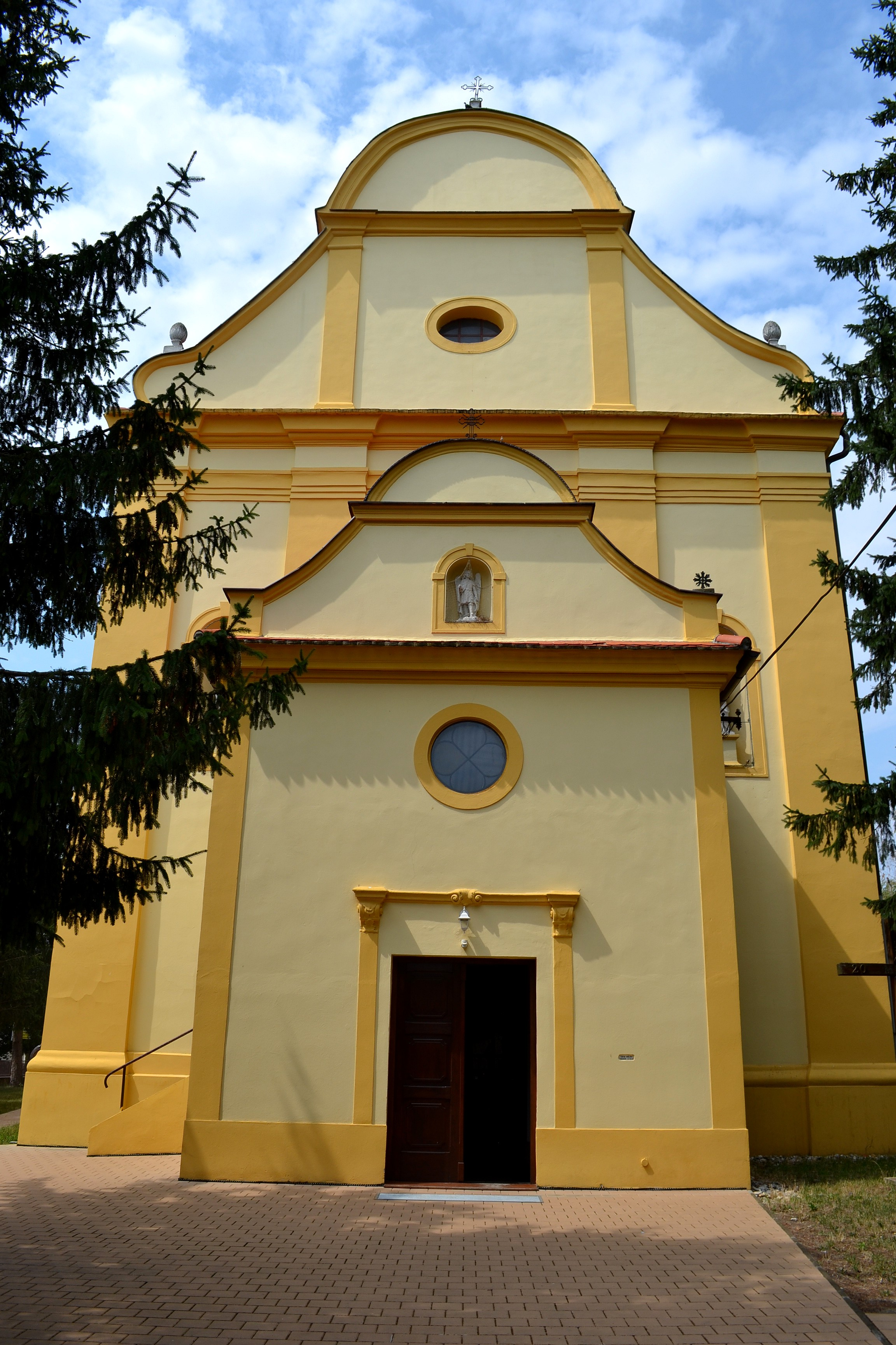 Láb (okr. Malacky), Kostol Všetkých svätých